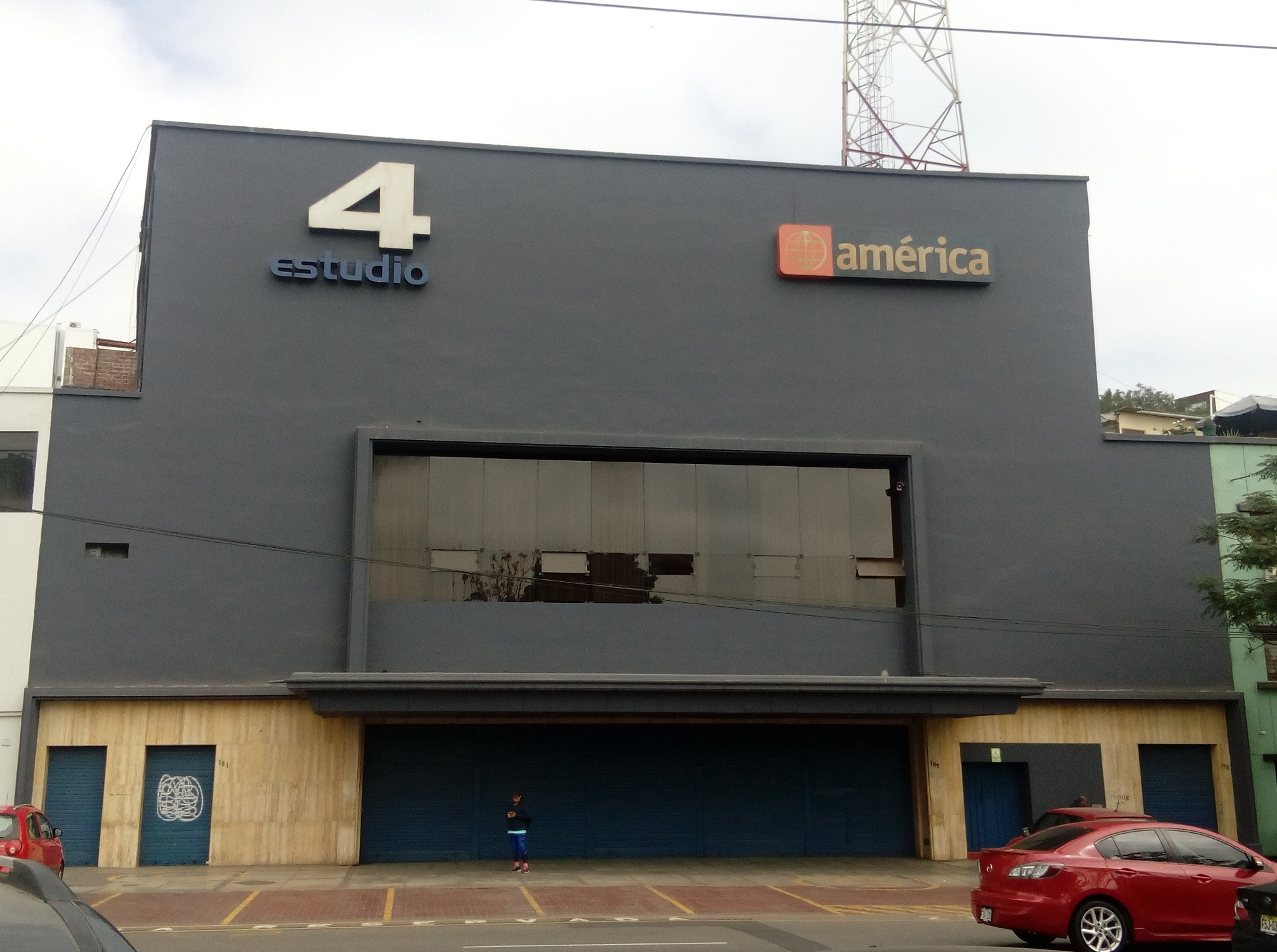 Exteriores del actualmente cerrado "Estudio 4" de América Televisión ubicado en Barranco.